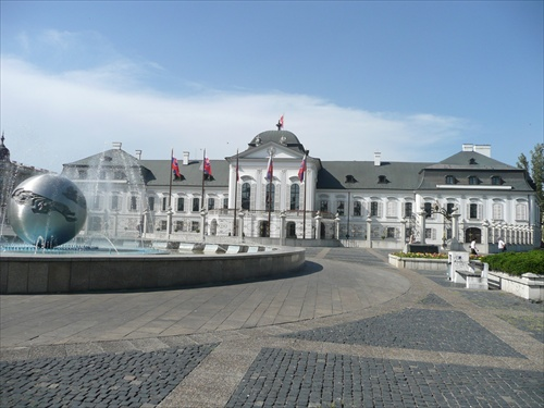 Celny pohlad na palac